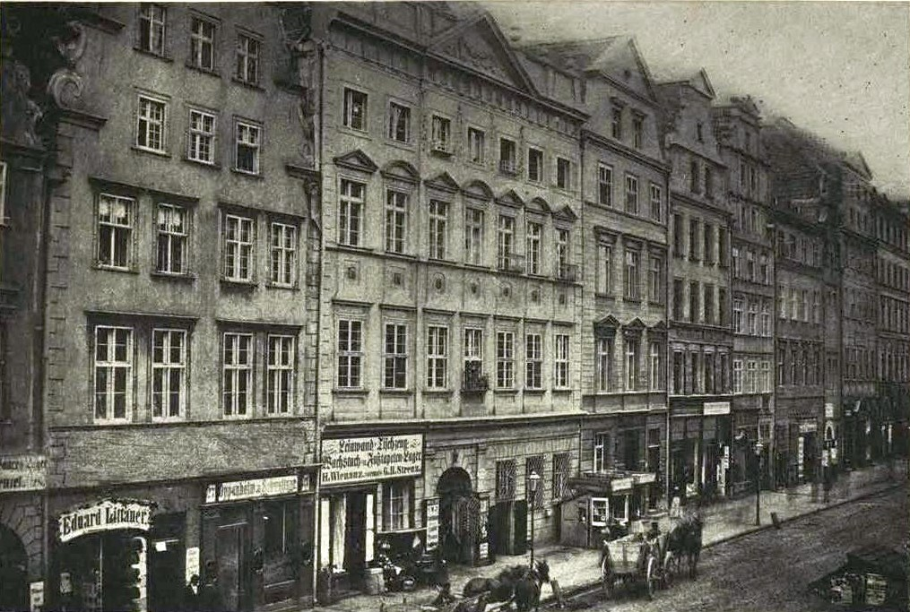 Południowa strona wrocławskiego Rynku Kamienica Złotego Pucharu 26, kamienica 27 Widok z 1867 roku